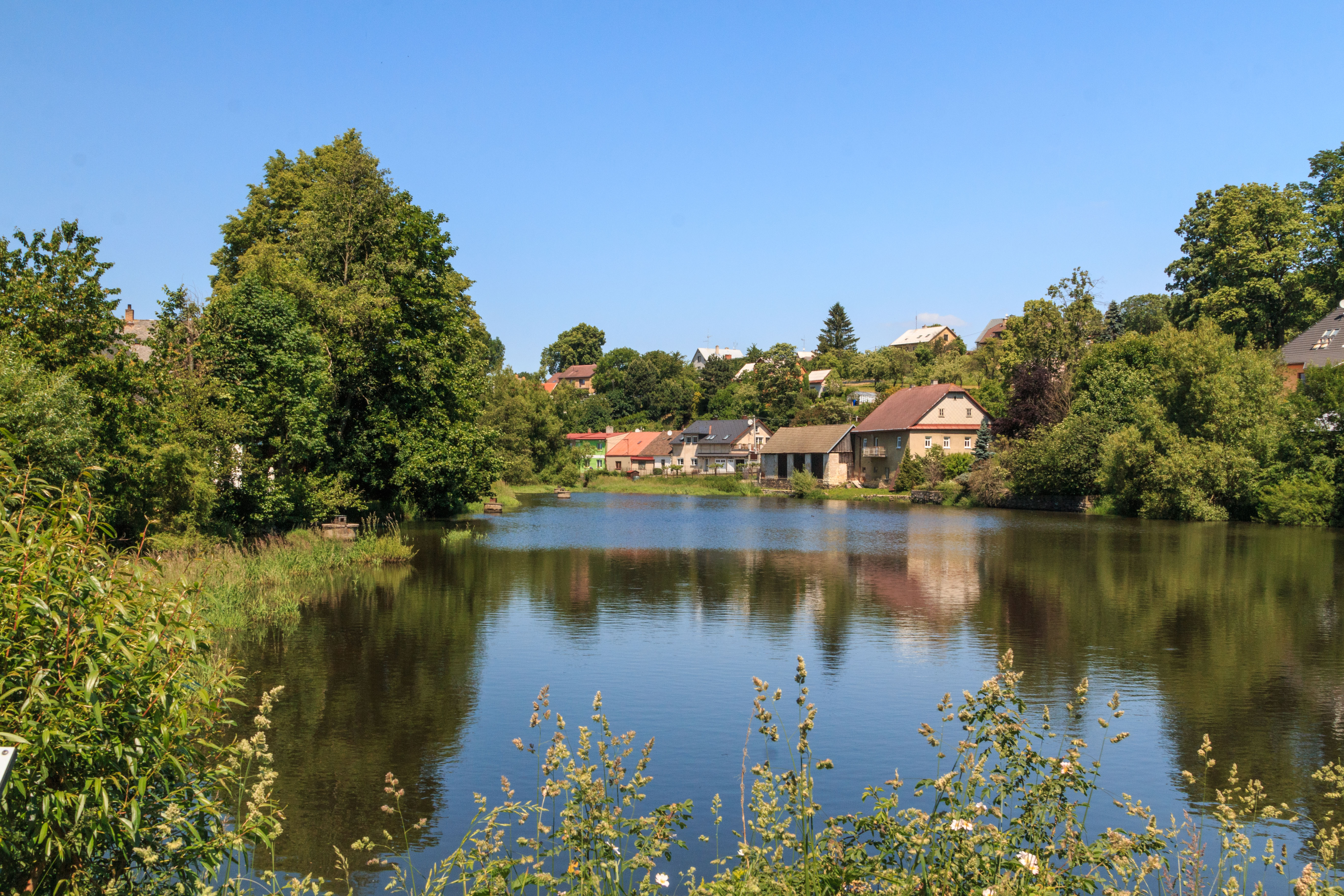 Panský rybník v Bystrém Project: Vodstvo.